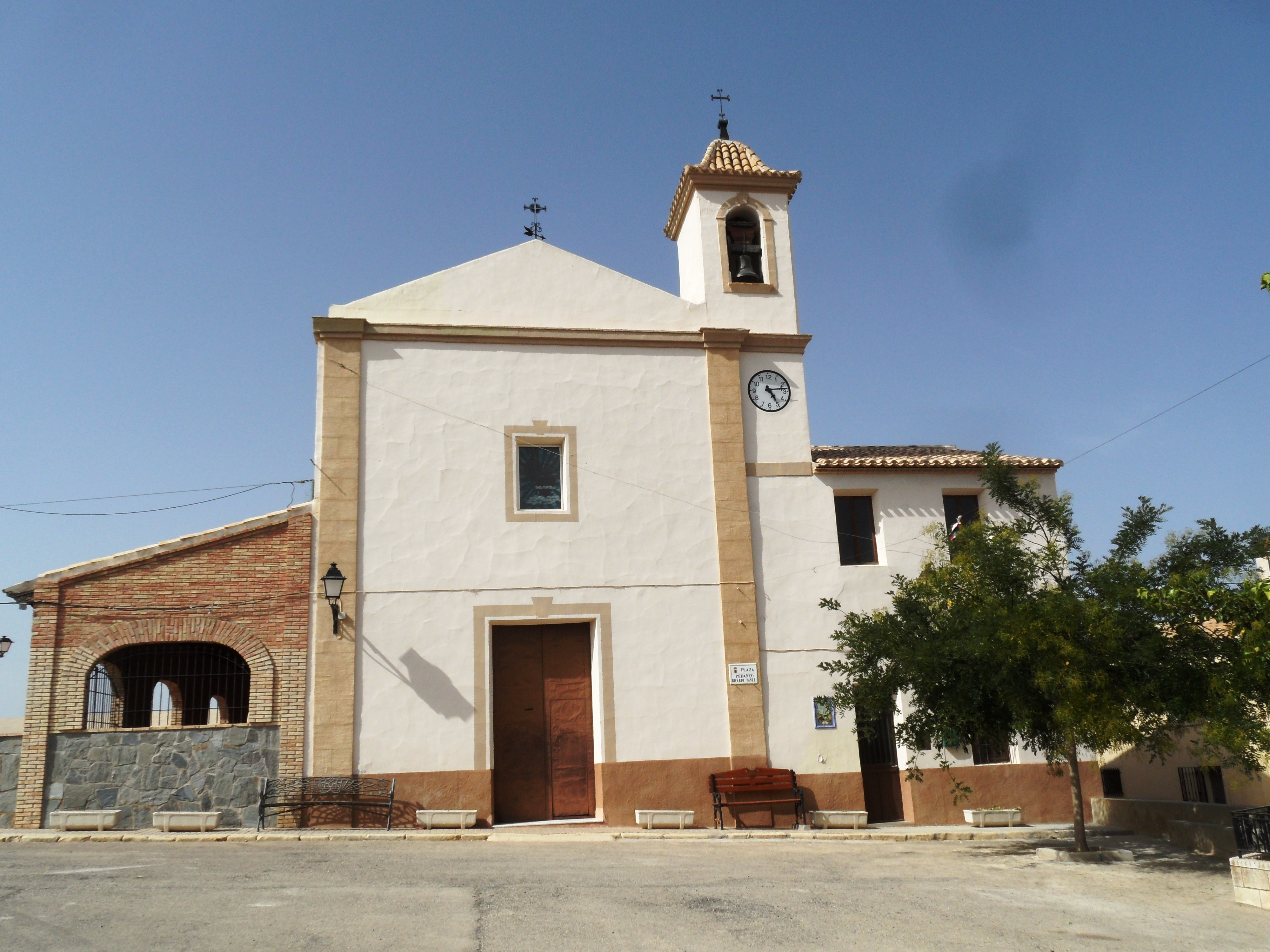 Portada de l'església del Raspai.